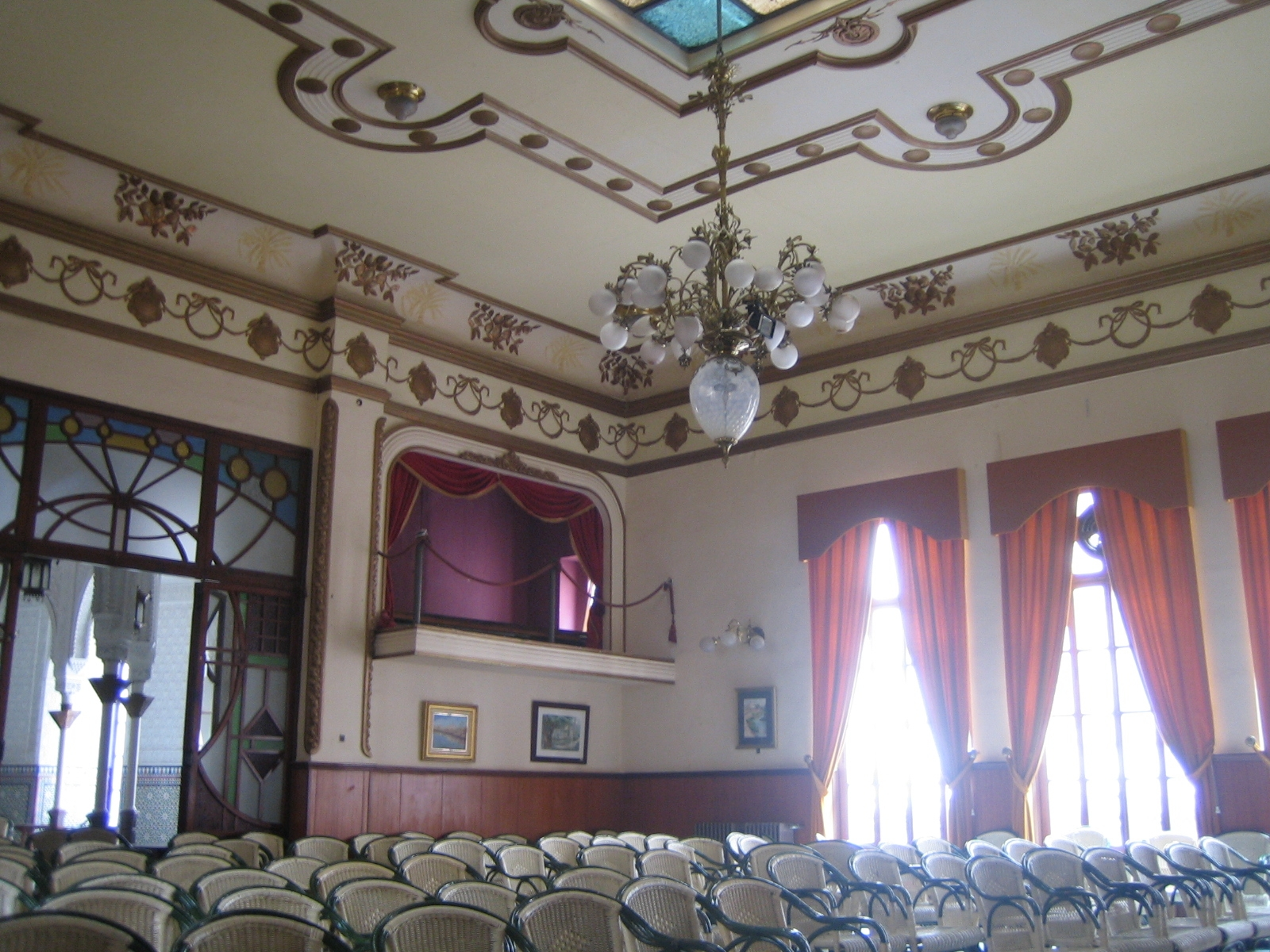 Salón dorado del Círculo Alzireño en Alzira (España).